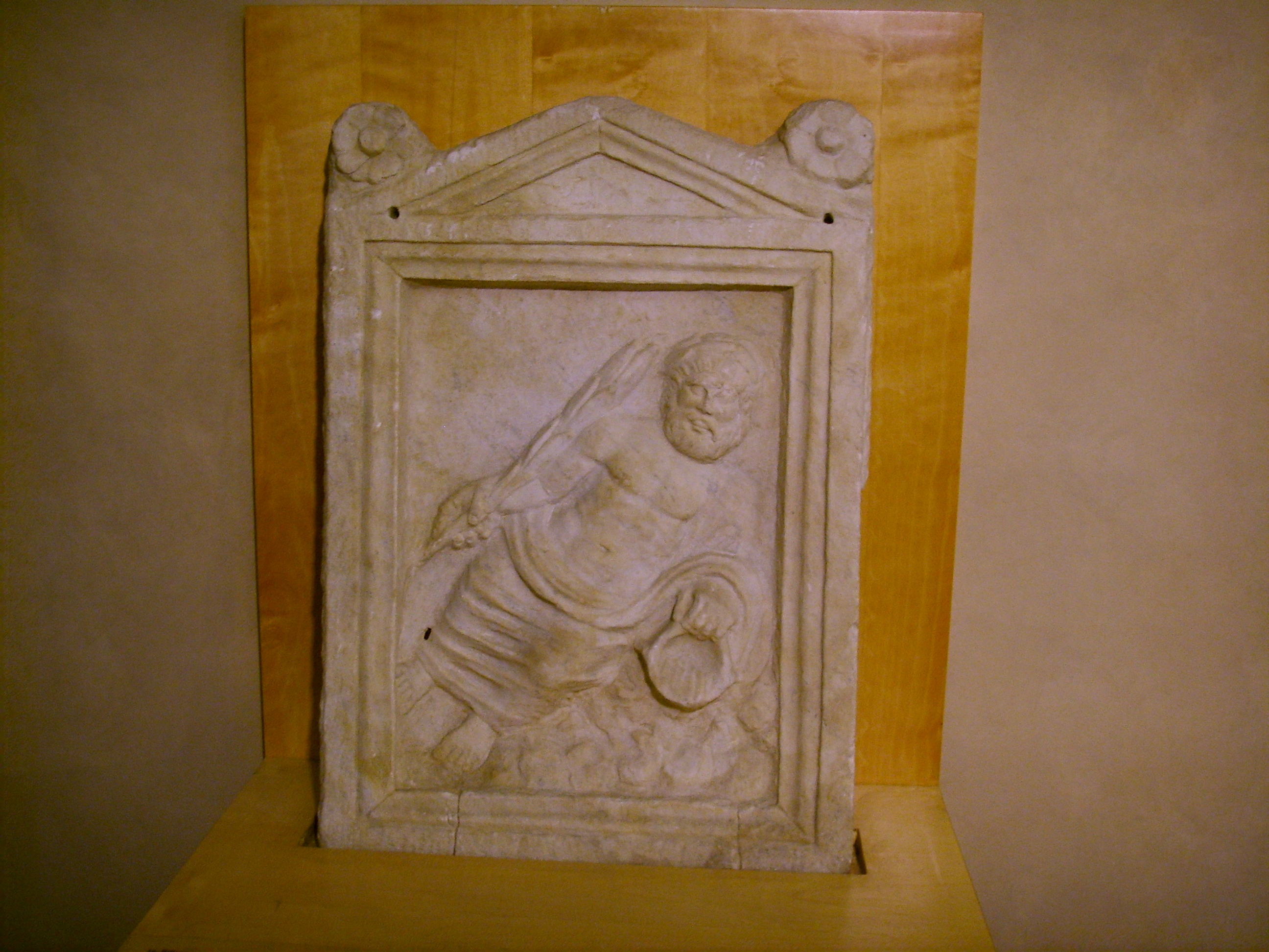 Museo Firenze com'era, archaeological room in Florence, italy